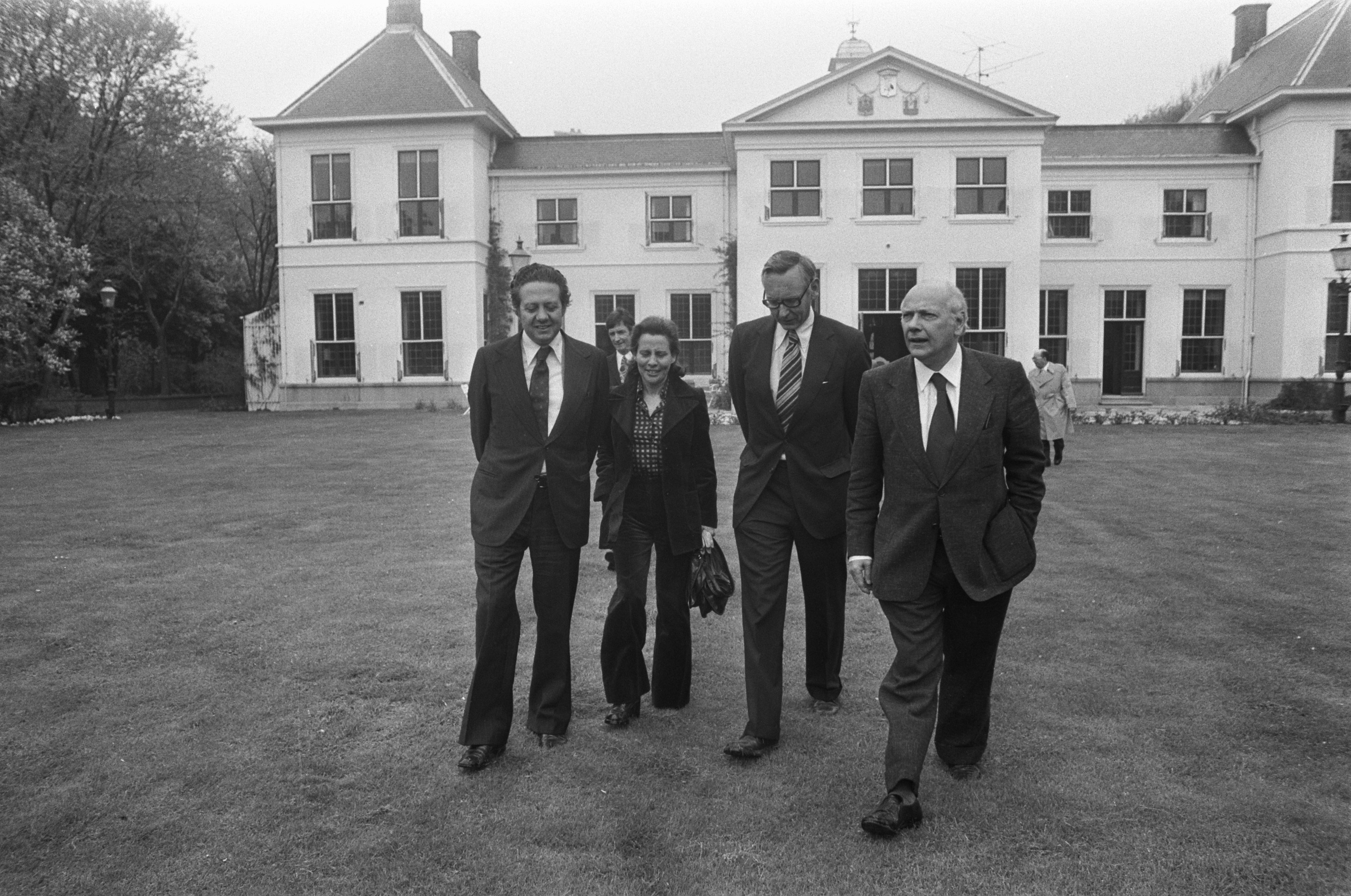 Collectie / Archief : Fotocollectie Anefo Reportage / Serie : [ onbekend ] Beschrijving : Mario Soares door Den Uyl in Catshuis ontvangen; Mario Soares, mevrouw Soares , Van der Stoel en Den Uyl voor Catshuis wandelend Datum : 4 mei 1974 Locatie : Den Haag, Portugal Trefwoorden : ministers, ontvangsten, premiers Persoonsnaam : Soares, Mario, Stoel, Max van der, Uyl, Joop den Fotograaf : Peters, Hans / Anefo Auteursrechthebbende : Nationaal Archief Materiaalsoort : Negatief (zwart/wit) Nummer archiefinventaris : bekijk toegang 2.24.01.05 Bestanddeelnummer : 927-1691